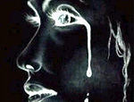 español